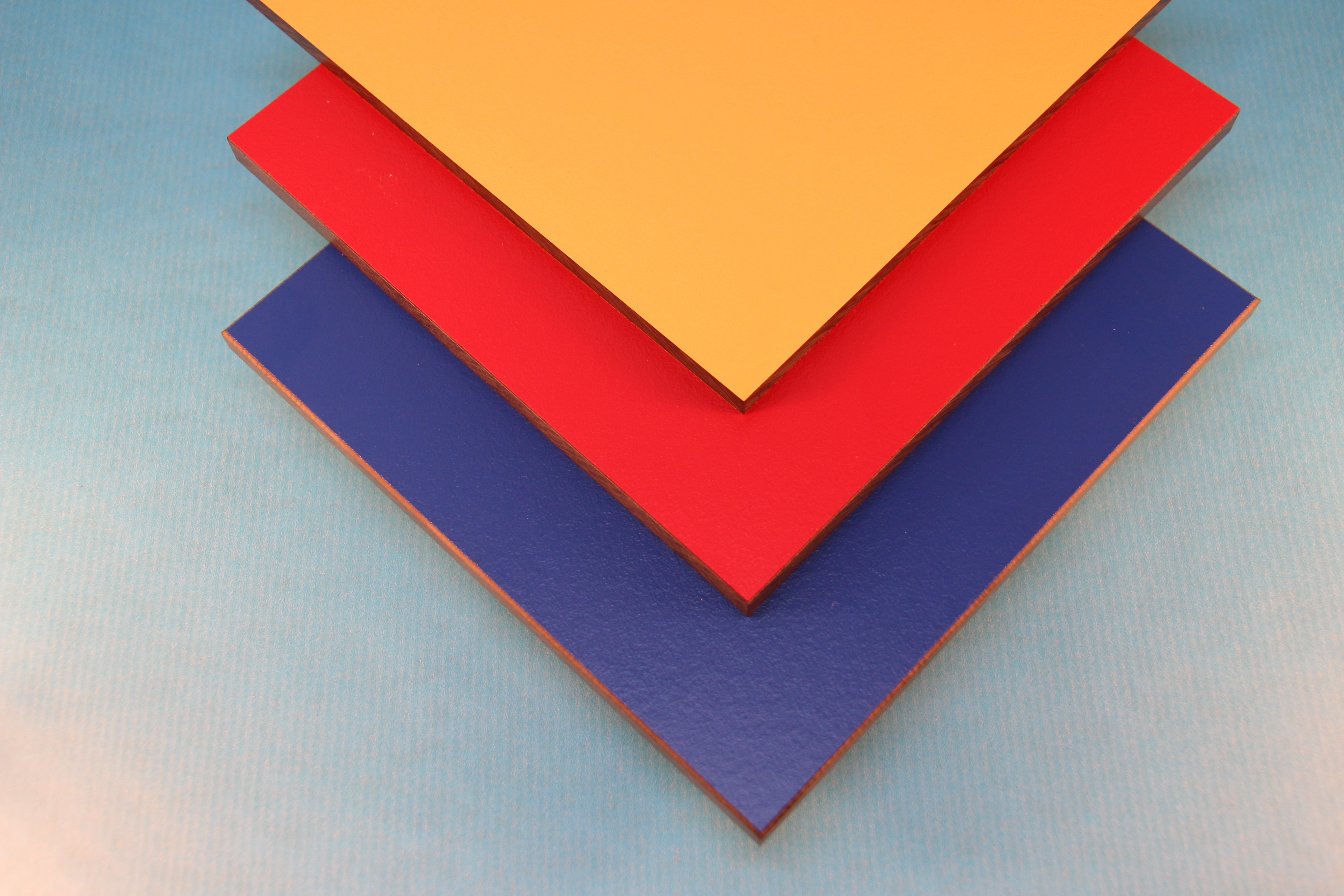 HPL-Platten in verschiedenen Uni Dekoren blau, rot, gelb